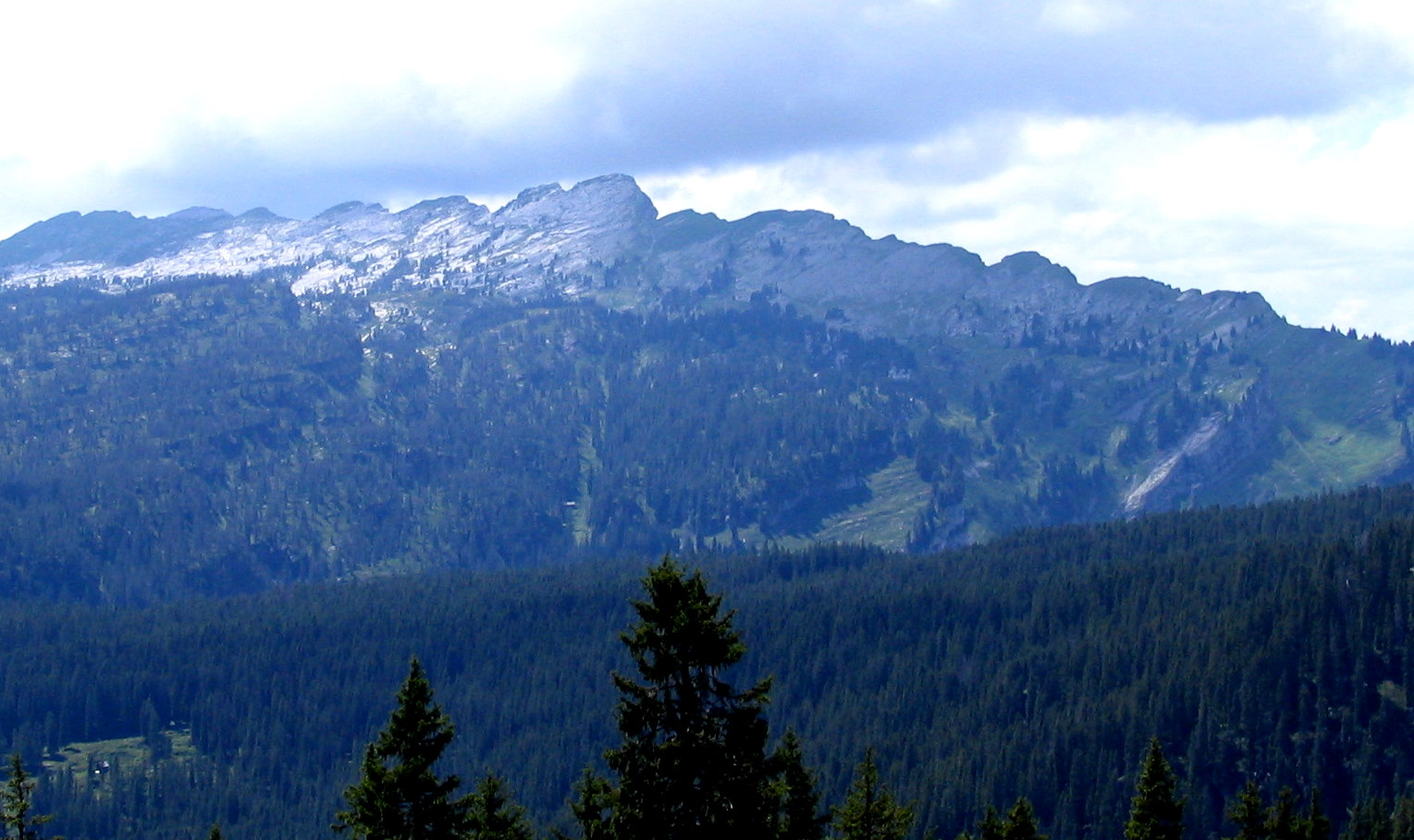 Sieben Hengste, Gebirgszug in der Schweiz (Kanton Bern) von Osten aus aufgenommen.